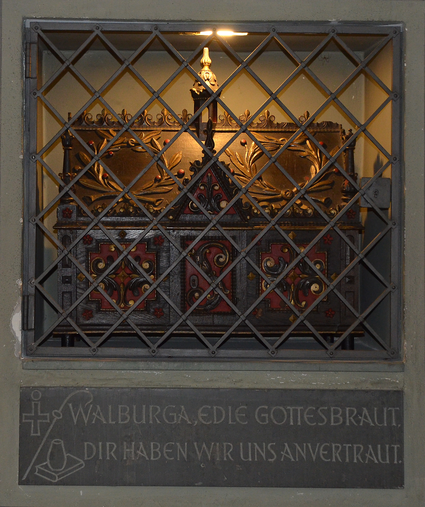 denkmalgeschützte Propsteikirche, Reliquienschrein, hl. Walburga